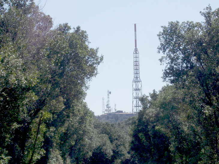 La vetta del Monte Telegrafo con sullo sfondo le antenne e la stazione meteorologica di Monte Argentario